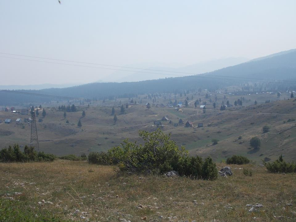 Panorama Slatine